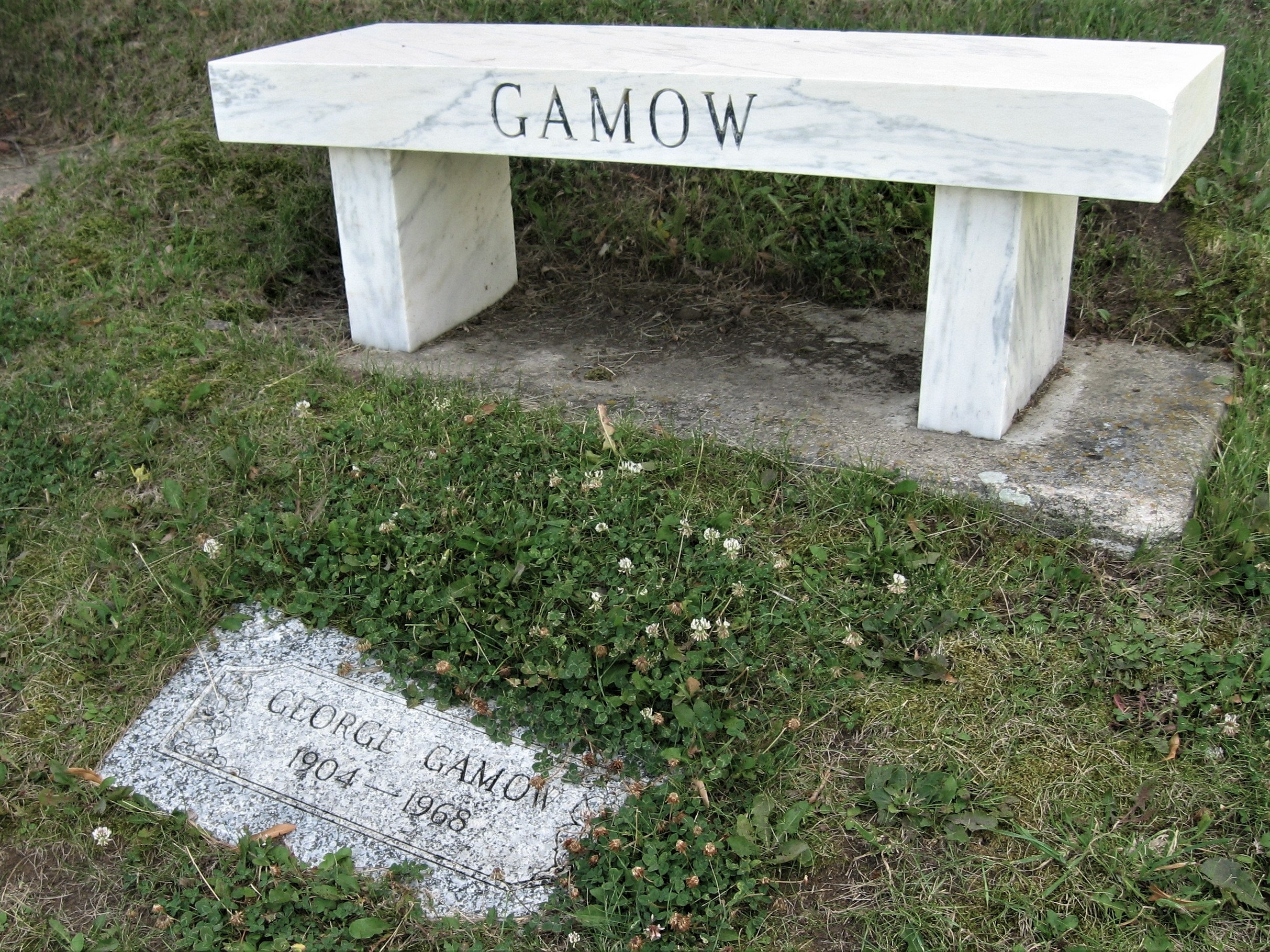 Gamow sírja Boulderben a Green Mountain temetőben (Fotó: Kiss Miklós 2010)